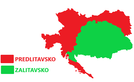 Červené - Zalitavsko Zelené - Predlitavsko